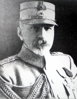 Mareșalul Constantin Presan.